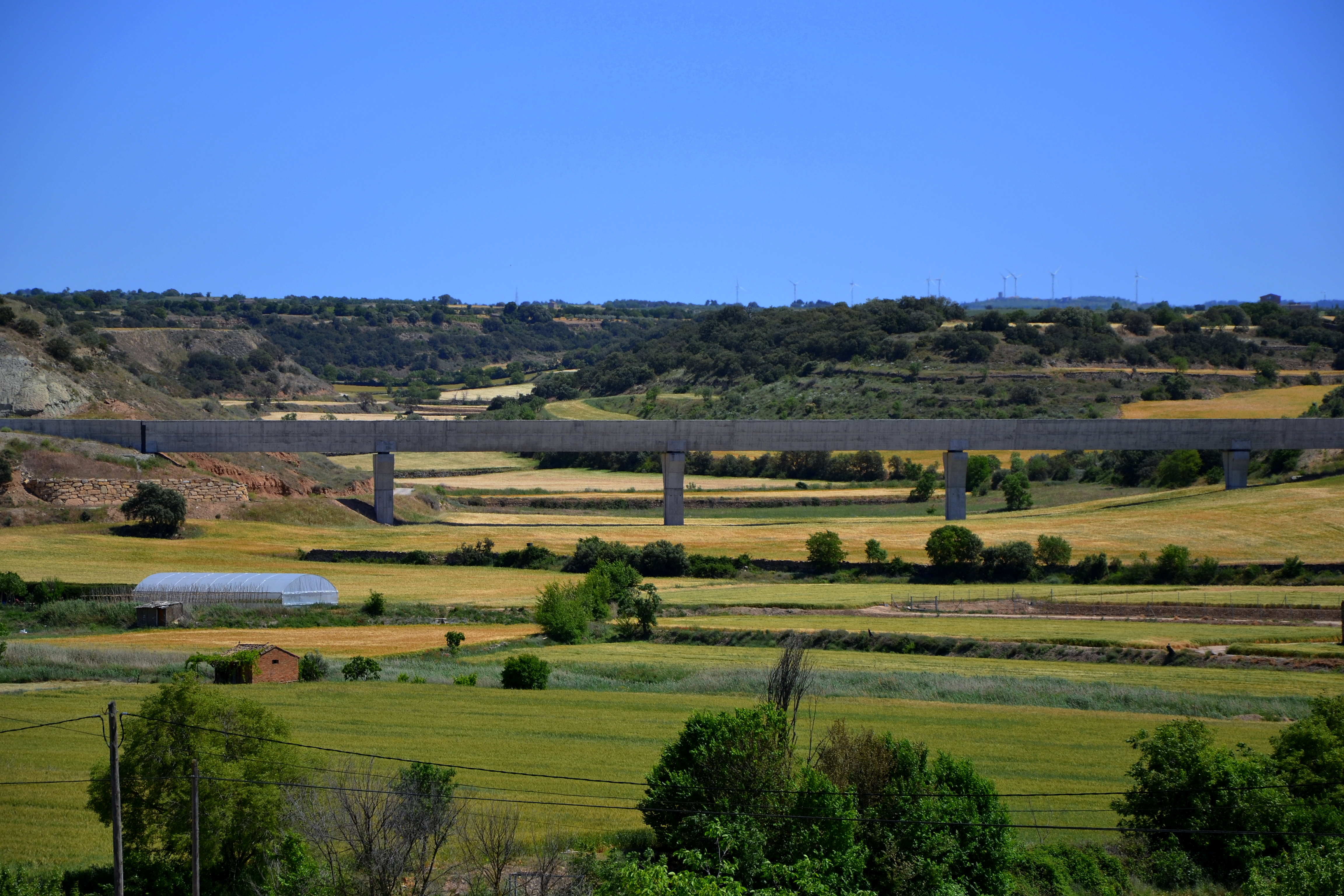 Canal Segarra-Garrigues al Talladell (Tàrrega) This is a a photo of a natural area in Catalonia, Spain, with id: ES510254